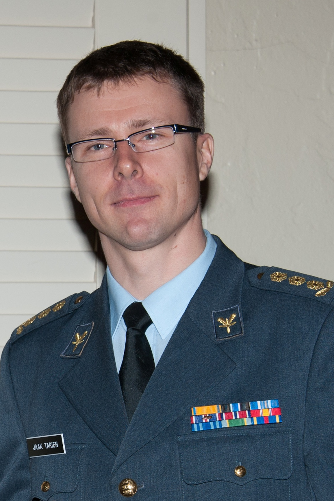 Kolonel Jaak Tarien